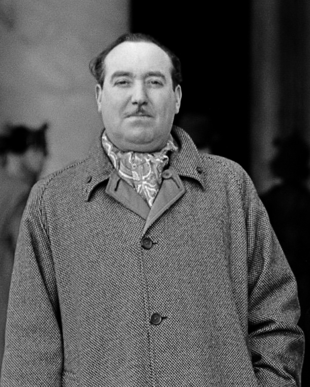 Lee Garmes en zijn vrouw voor de ingang van de Sint-Pietersbasiliek december 1937